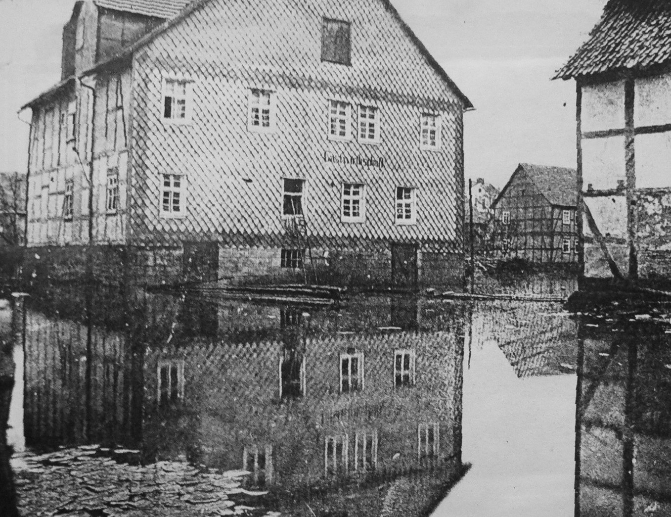 Weserhochwasser in Reinhardshagen-Veckerhagen am "Brauhaus" im Frühjahr 1909 Quelle: "Historisches Brauhaus", Reinhardshagen Fotograf: unbekannt, Repro presse03 11:30, 20. Feb 2006 (CET) Datum: Repro 2006